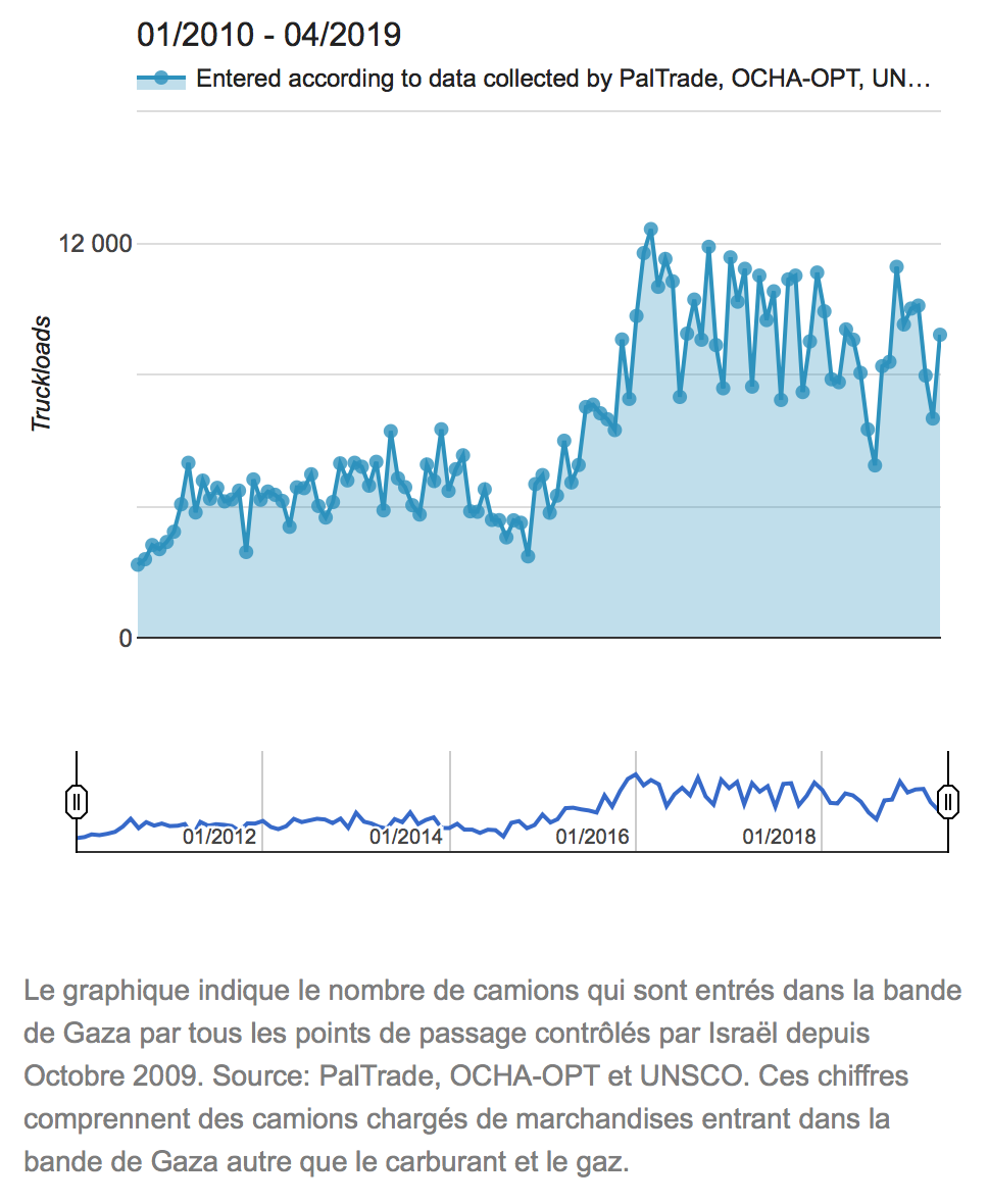 Le graphique indique le nombre de camions qui sont entrés mensuellement dans la bande de Gaza par tous les points de passage contrôlés par Israël depuis octobre 2009 jusqu'en avril 2019. Sources : PalTrade, OCHA-OPT et UNSCO (publication sur ( Ces chiffres comprennent des camions chargés de marchandises entrant dans la bande de Gaza autres que le carburant et le gaz. (Entrance of goods to Gaza from Israel)